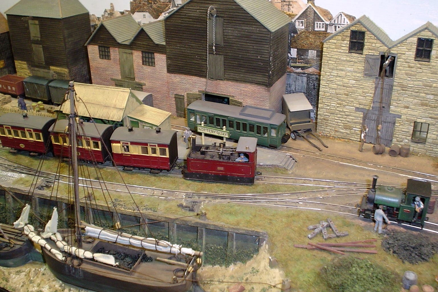 Ausschnitt der Modelleisenbahnanlage Nottery Quay des Britten Chris O‘ Donnghue. Die Anlage wiedergibt eine typischen Britischen Schmalspurbahn in der Nenngrösse 00, im Massstab 1:76 mit einer Modellspurweite von 9 mm (Spur 00-9). Die Anlage ist zerlegbar und transportable. Sie war unter anderem der Expométric 2005 in Villebon bei Paris ausgestellt. Die meisten aus Bausätzen erbauten Fahrzeuge wie auch die Geleise stammen weitgehend von Peco.